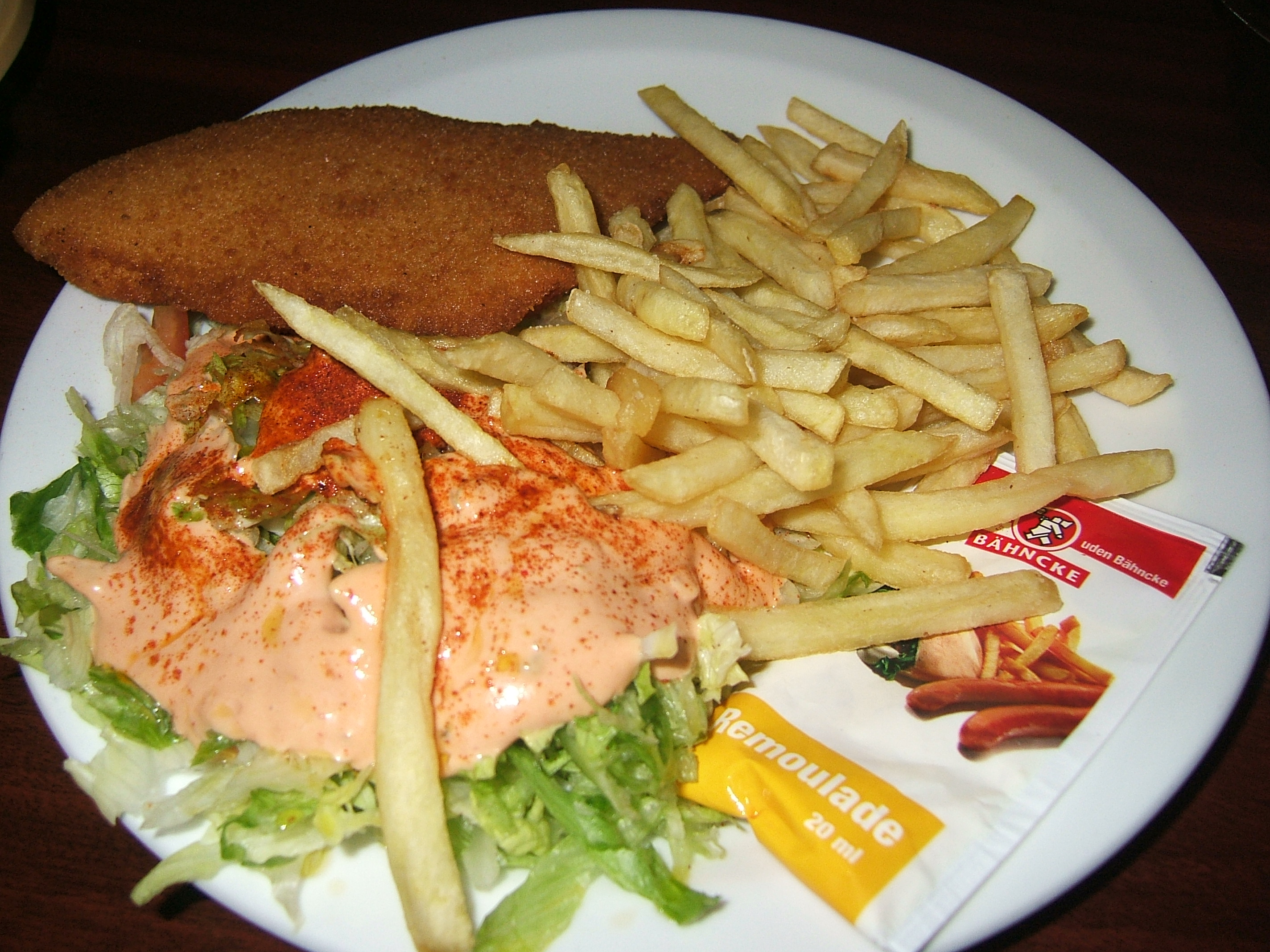 Un sachet de rémoulade dans une assiette servie par un restaurant turc à Copenhague.